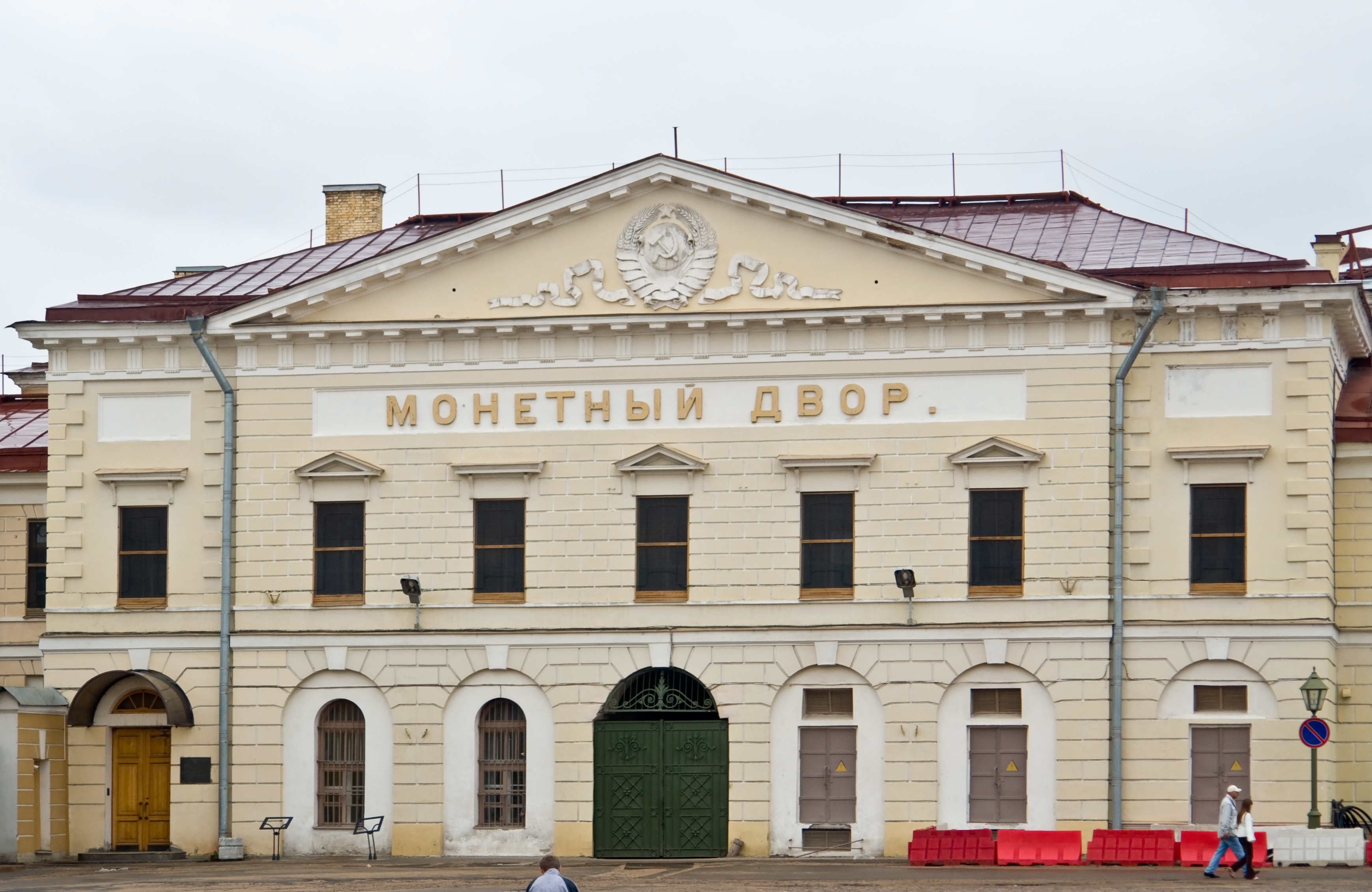 Монетный двор (Петропавловская крепость)